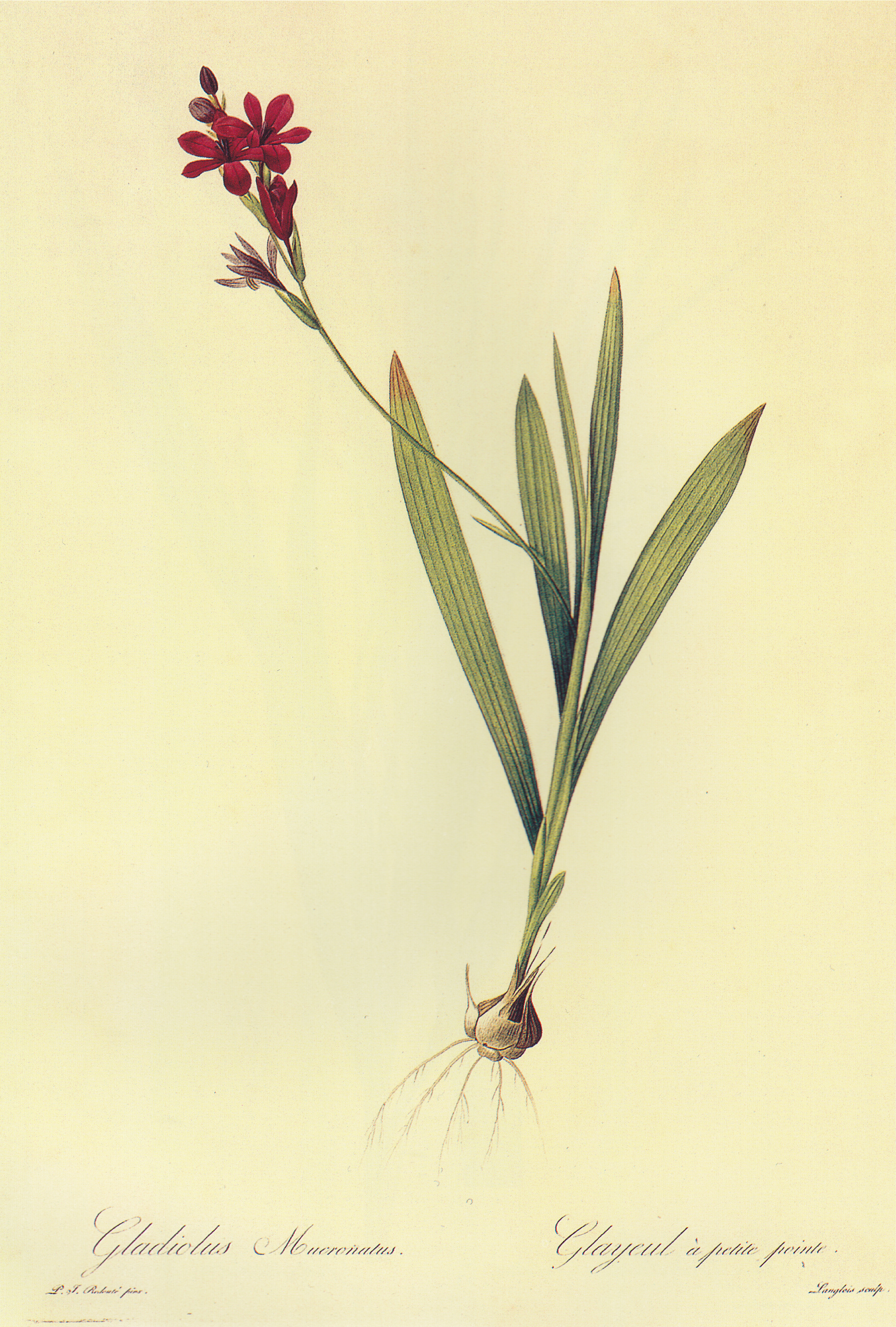 猩红狒狒花。原产于南非。